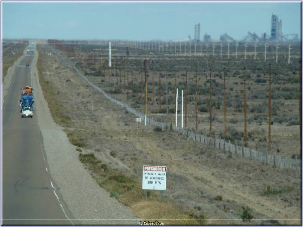 Ruta 43 a la altura de Pico Truncado